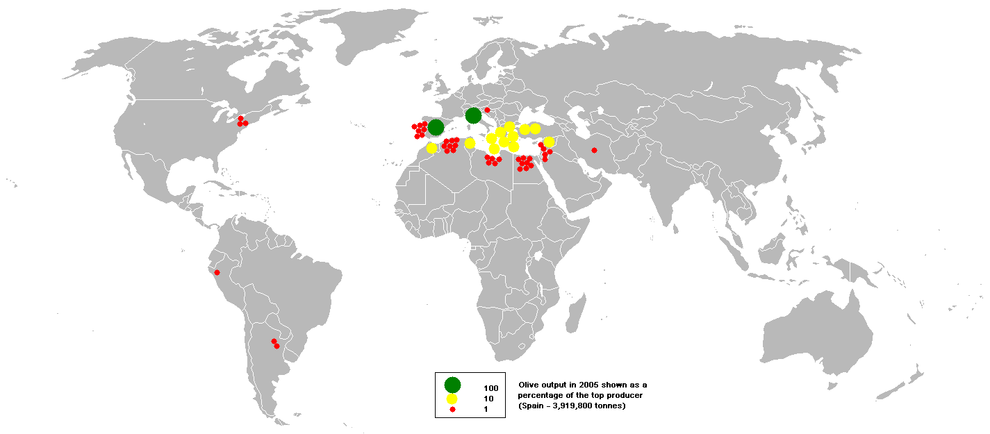 Production oléicole mondiale en 2005